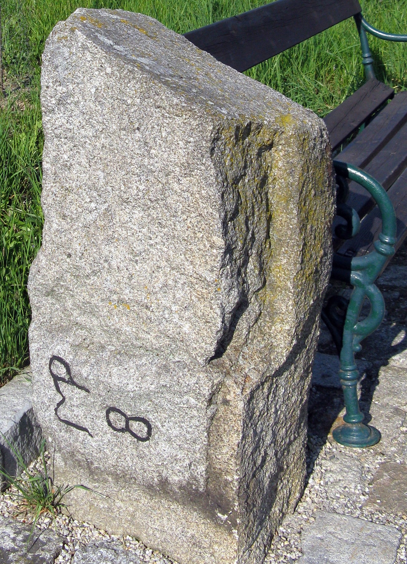 Burgfriedstein Scherer in Perg, Oberösterreich, südlich des Gehöftes Scherer, situiert neben dem Schererweg (Strasse). Gut erhalten.